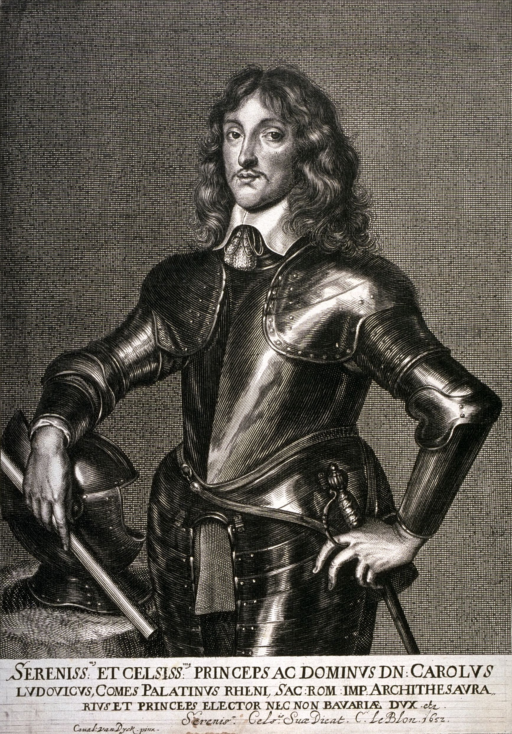 Karl I. Ludwig, Kürfürst von der Pfalz